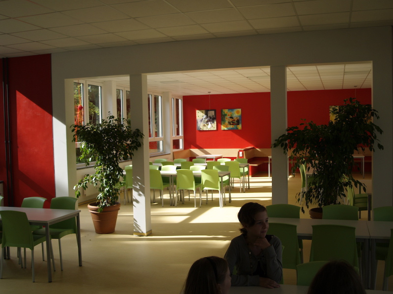 Die neu eingerichtete Mensa der Freiherr-vom-Stein-Schule, Fulda verköstigt zur Zeit täglich rund 250 Schüler und Schülerinnen mit biologisch hochwertigem Essen.